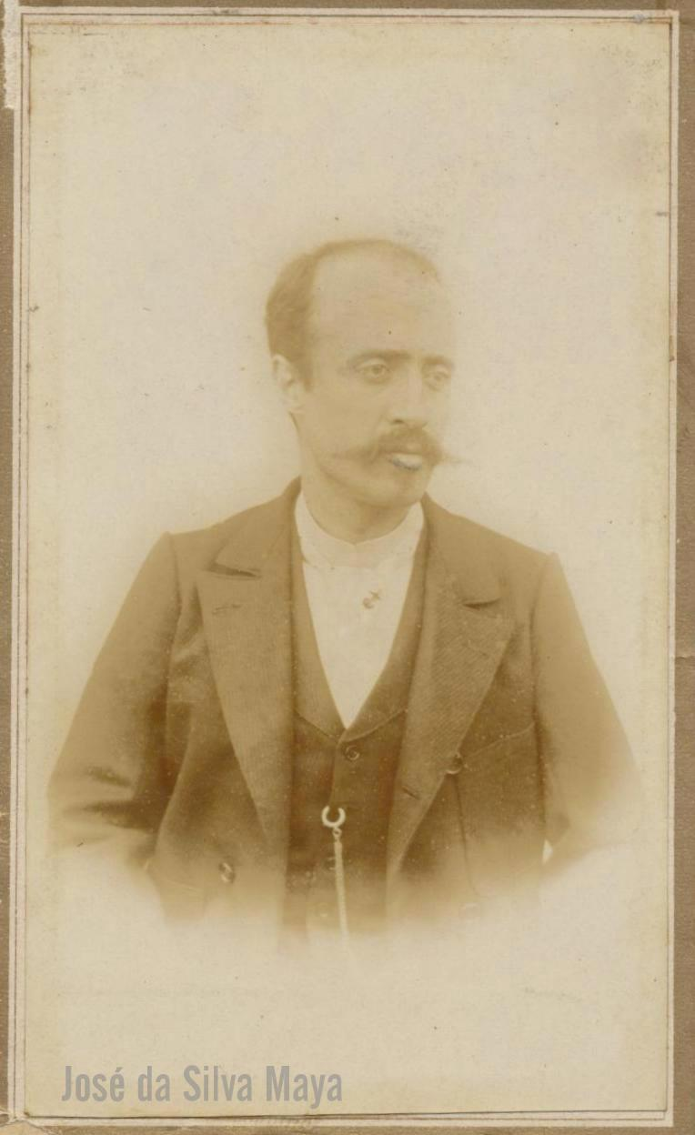 Foto de José da Silva Maya - século XIX, fotógrafo desconhecido.